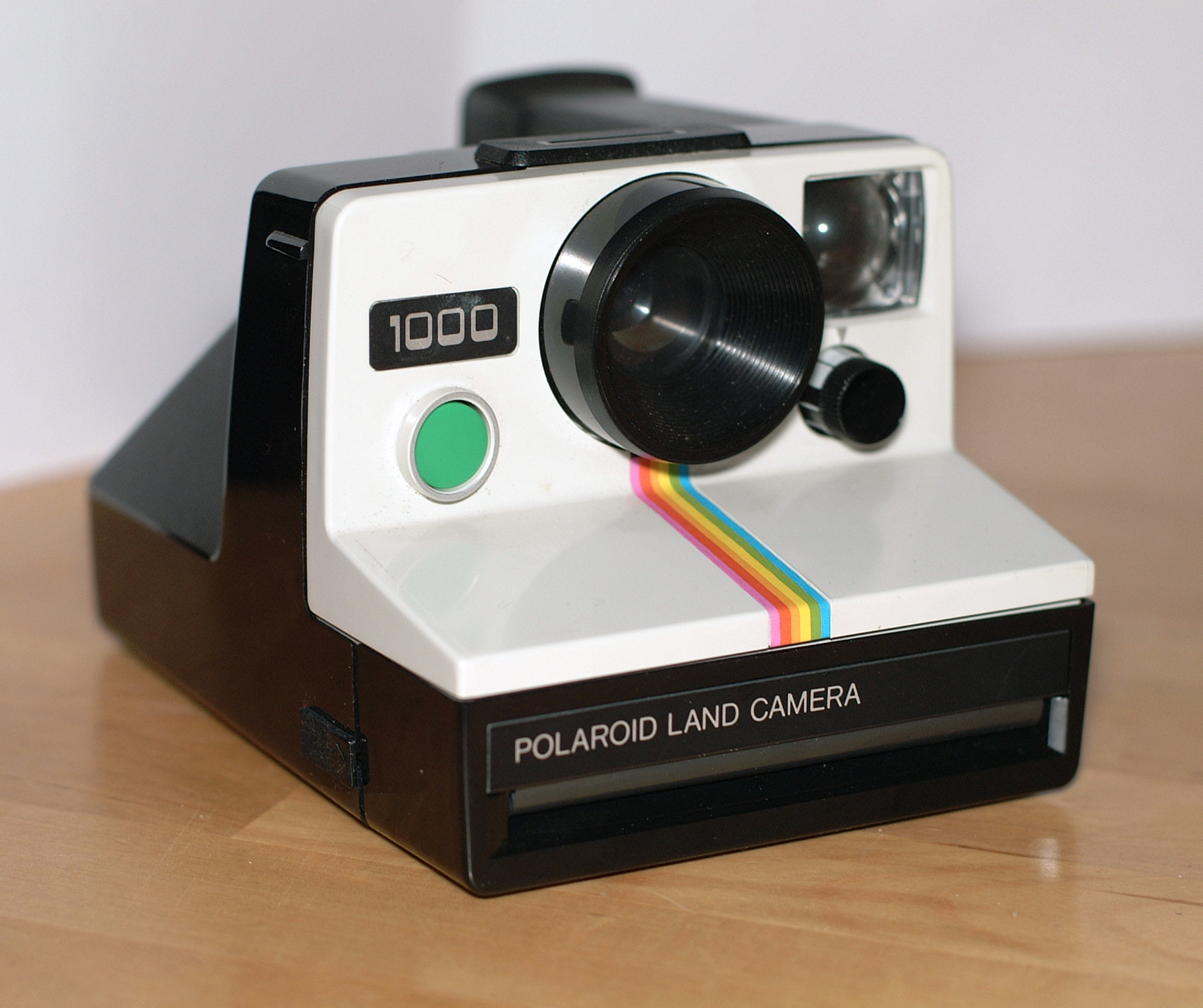 Polaroid Land Camera 1000